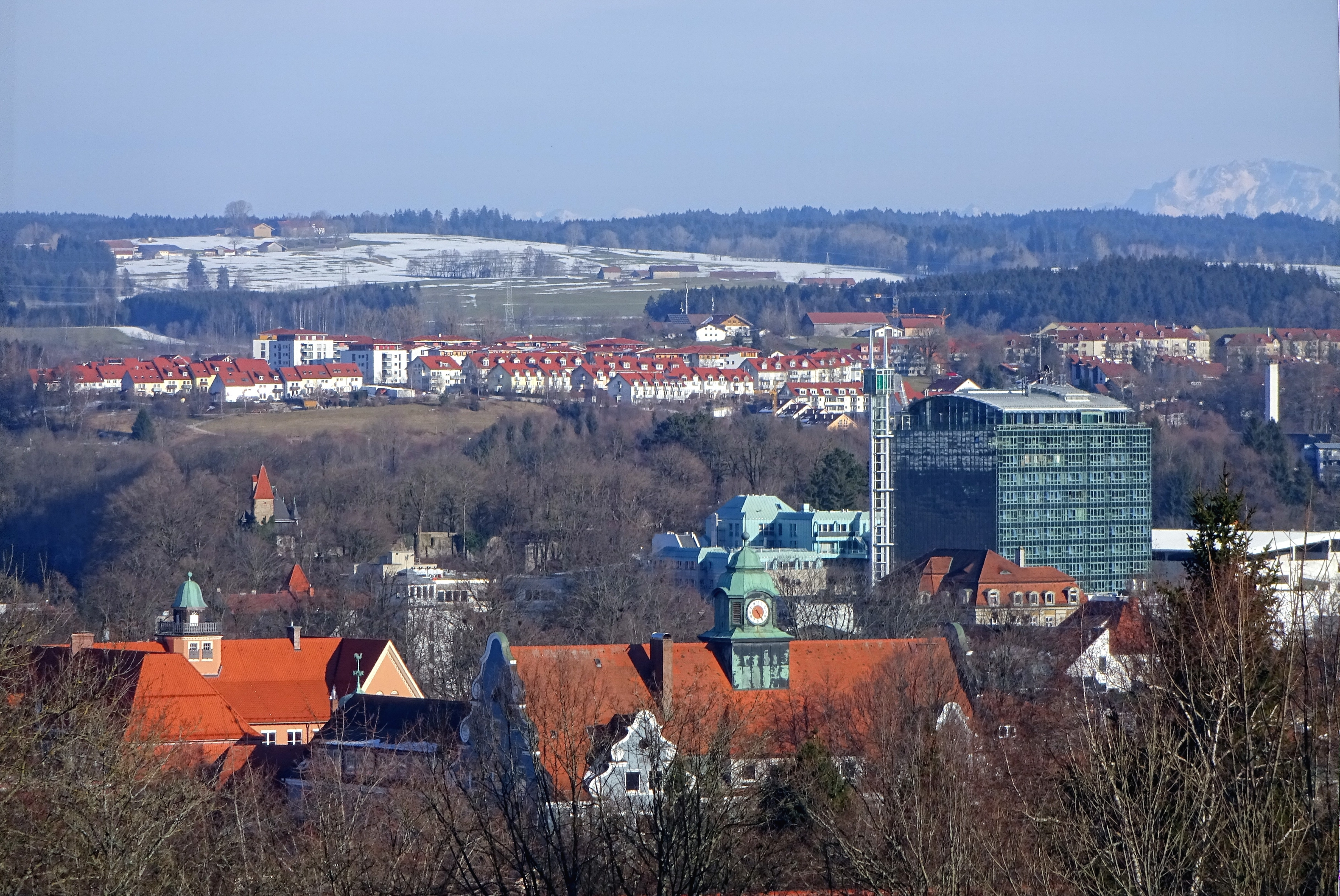 vom Reichelsberg aus März 2015